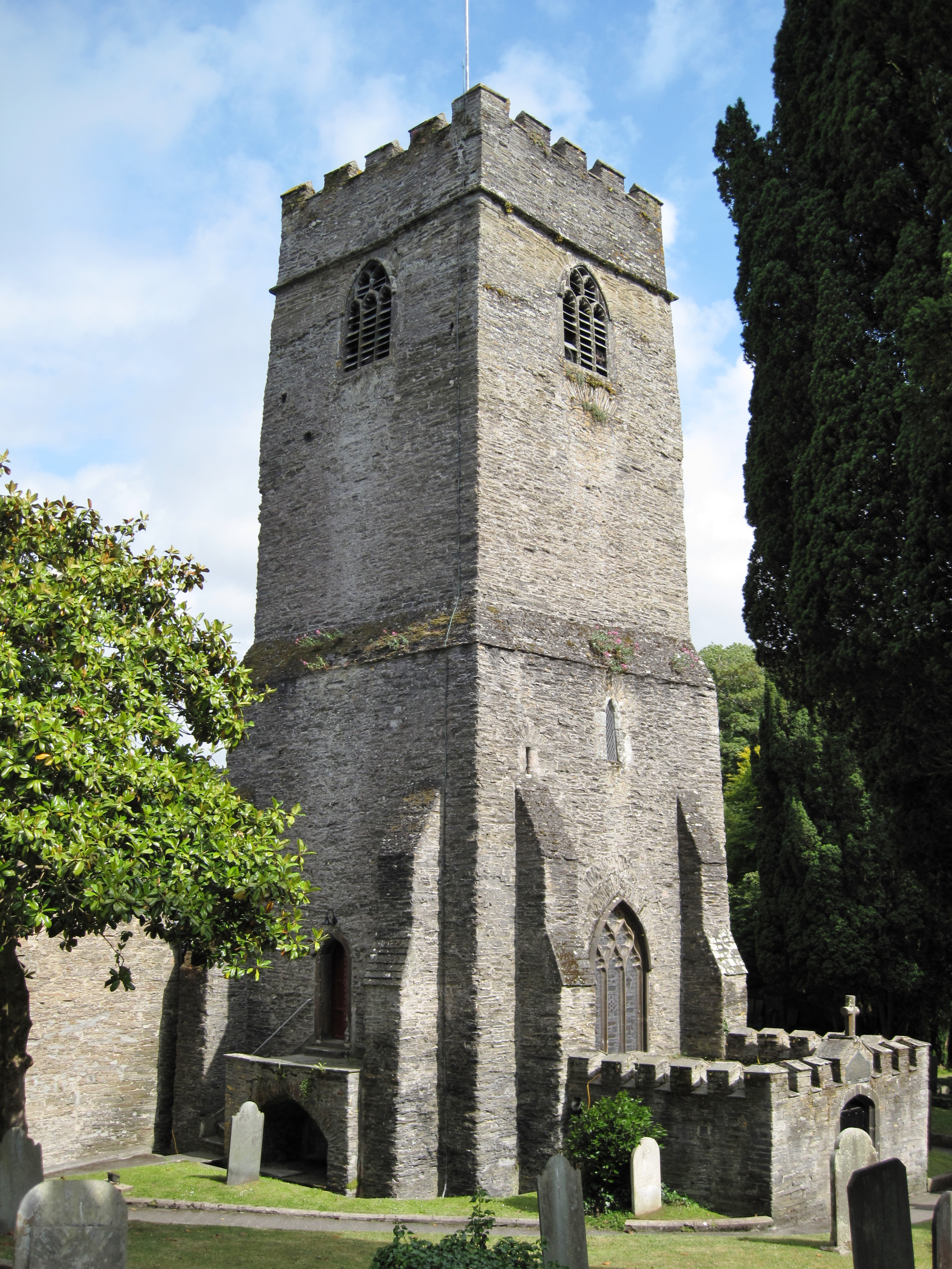 Kirchturm von St. Petroc in Padstow, Cornwall, Großbritannien